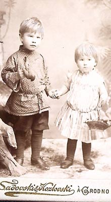 Максім Багдановіч з старэйшым братам Вадзімам. г. Гродна. 1893 г. Фотаздымак у сямейным альбоме